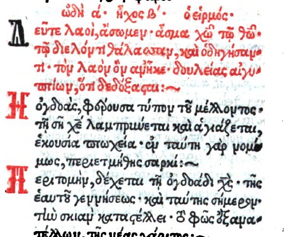 Канон Обрезанию, Песнь 1, Служебная минея на древнегреческом, месяц: Январь, 1552 год Венеция.